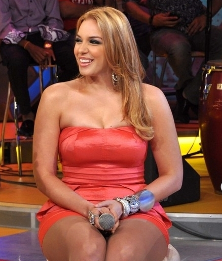 La presentadora de televisión y actriz dominicana Hony Estrella.